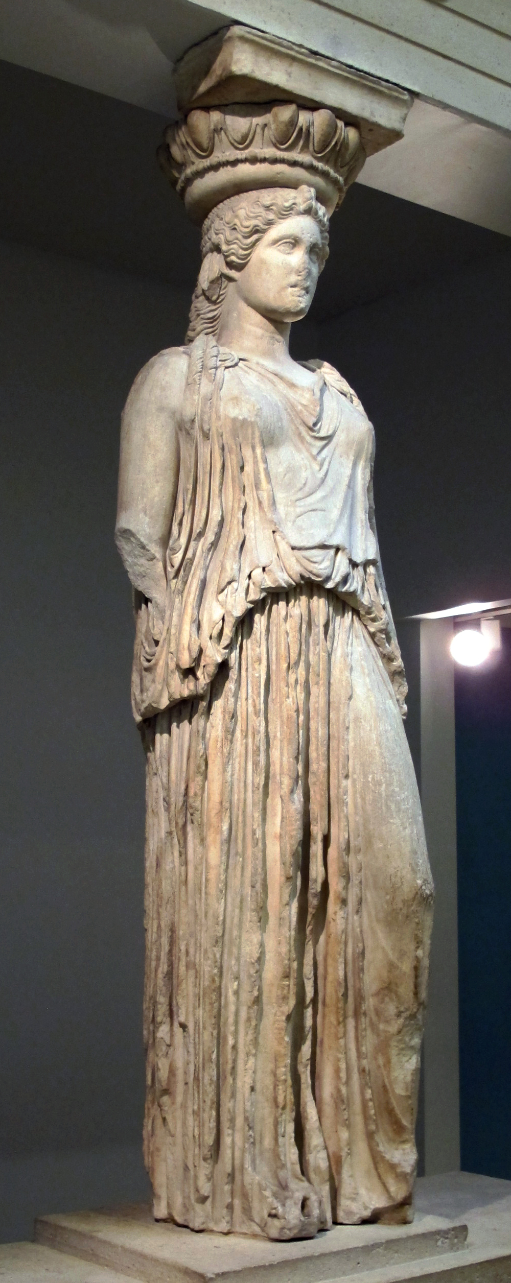 Cariatide dall'eretteo, 415 ac.